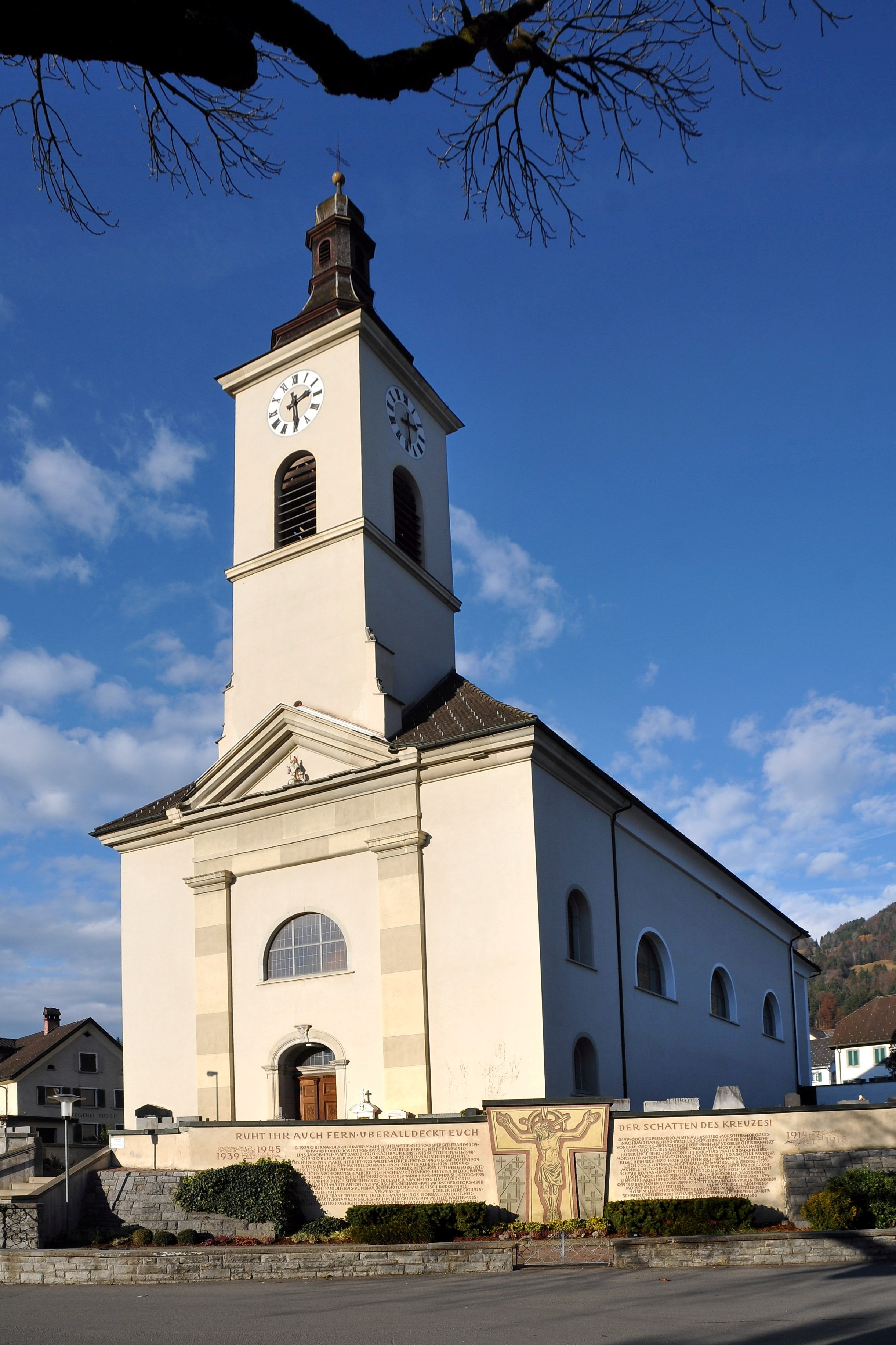 Pfarrkirche "hl. Georg" in Satteins in Vorarlberg. Im Vordergrund das Kriegerdenkmal. Kriegerdenkmal